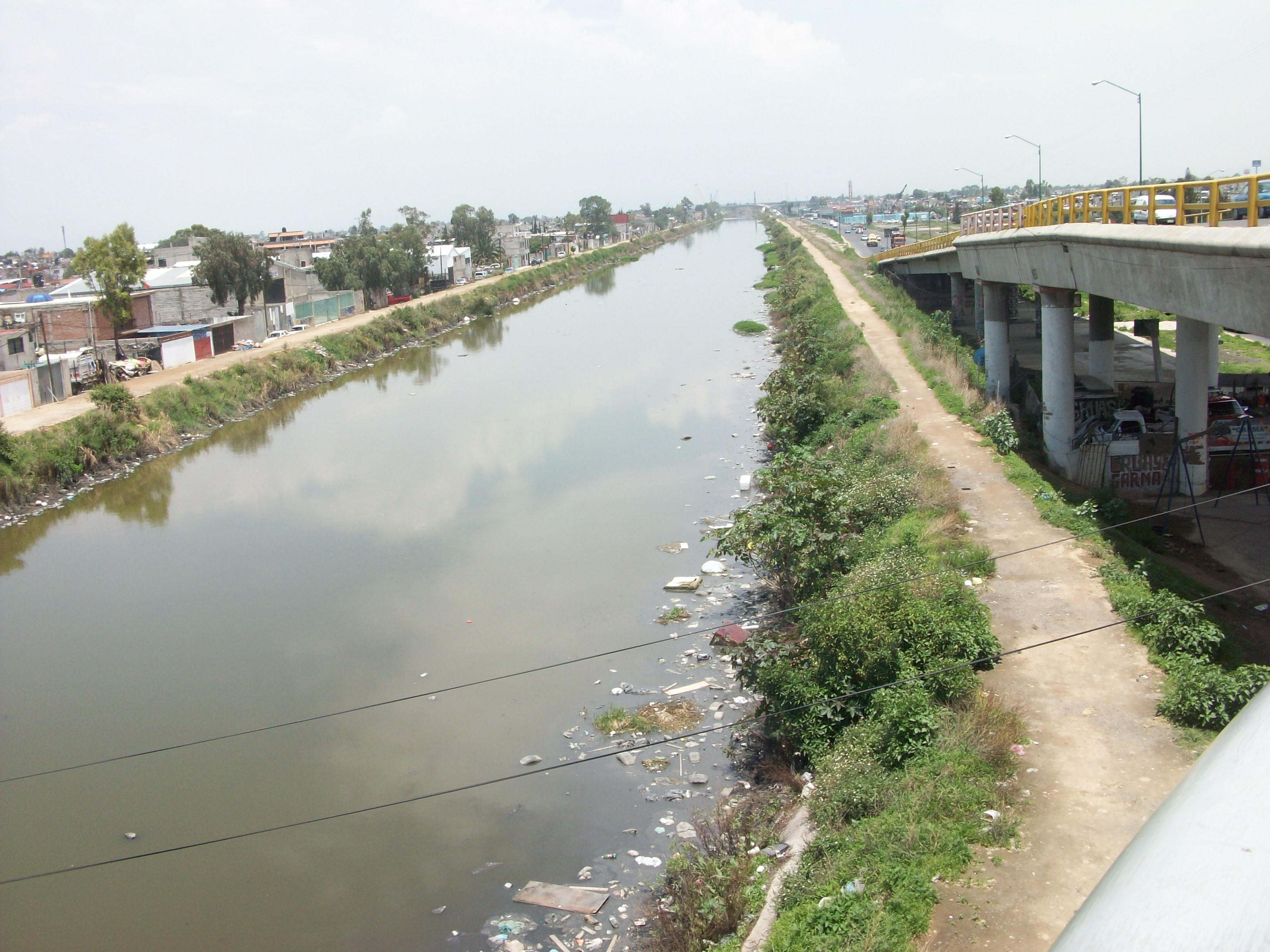 Rio de los Remedios